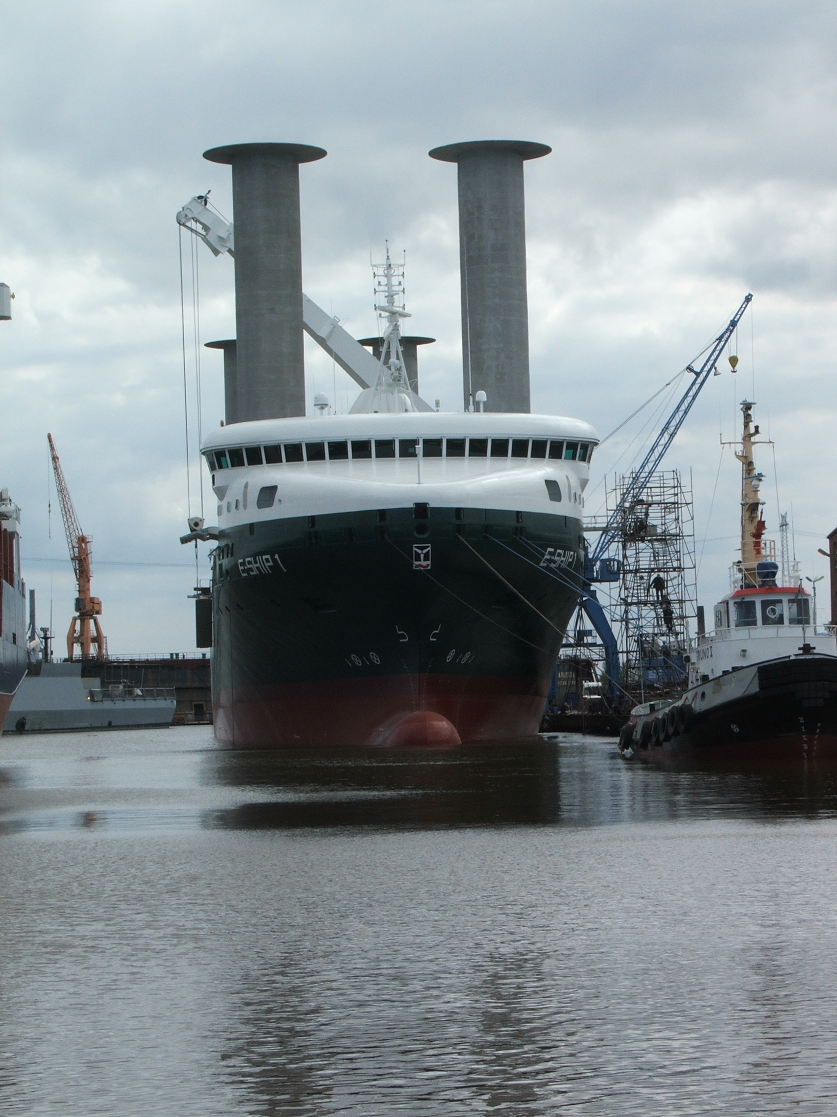 Die E-Ship 1 in Emden an der Cassens-Werft